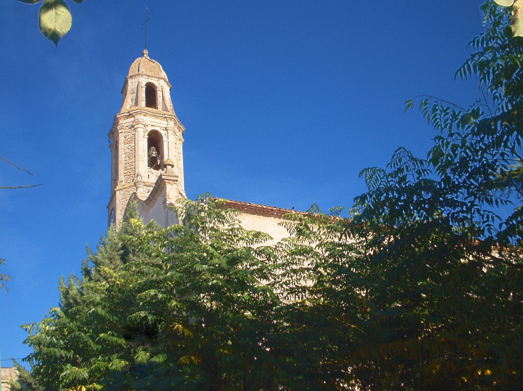 El campanar de l'església, típica obra catalana de començaments del segle XVIII domina la població i es deixa veure per sobre els arbres de la plaça de l'Ajuntament